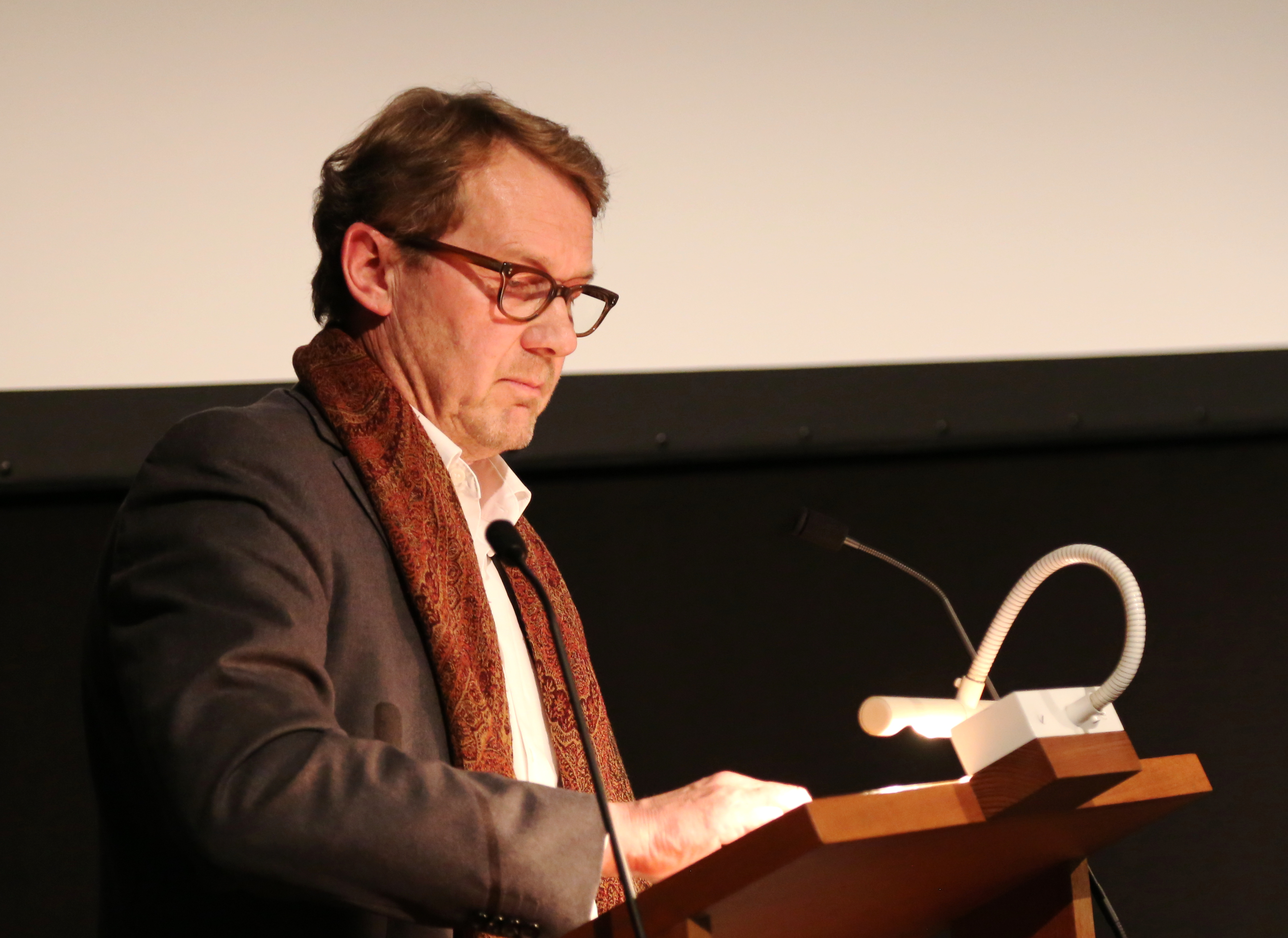 Andreas Meck, Architekt, Professor an der Hochschule München, Mitglied der Bayerischen Akademie der Schönen Künste